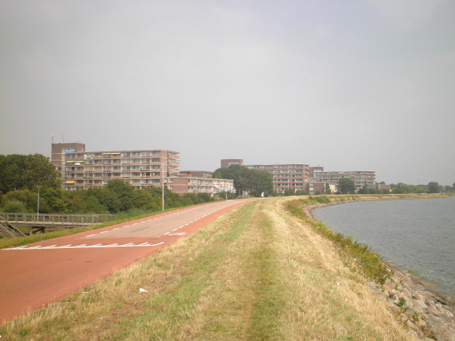 Zicht op de drie Sterrenflats aan de Astronautenweg in Hoorn, gezien vanaf de Westerdijk. Vooraan is de 3-sterrenflat, in het midden 2 en achteraan 1.